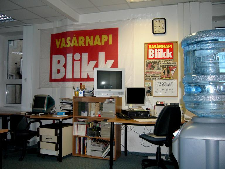 A Vasárnapi Blikk egykori részlege a Szugló utcában